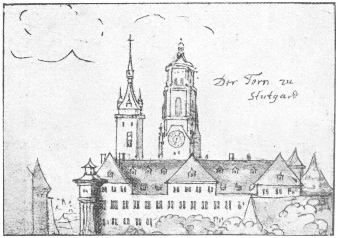 „Der Torn zu Stutgard [1628]“ (Der [Wasser]Turm zu Stuttgart), Kupferstich nach einer Federzeichnung von Wenzel Hollar, 5 x 11 cm, 1663, Kupferstichkabinett Berlin. – Alte Kanzlei mit der Merkursäule (linke Ecke), dahinter die Stiftskirche.